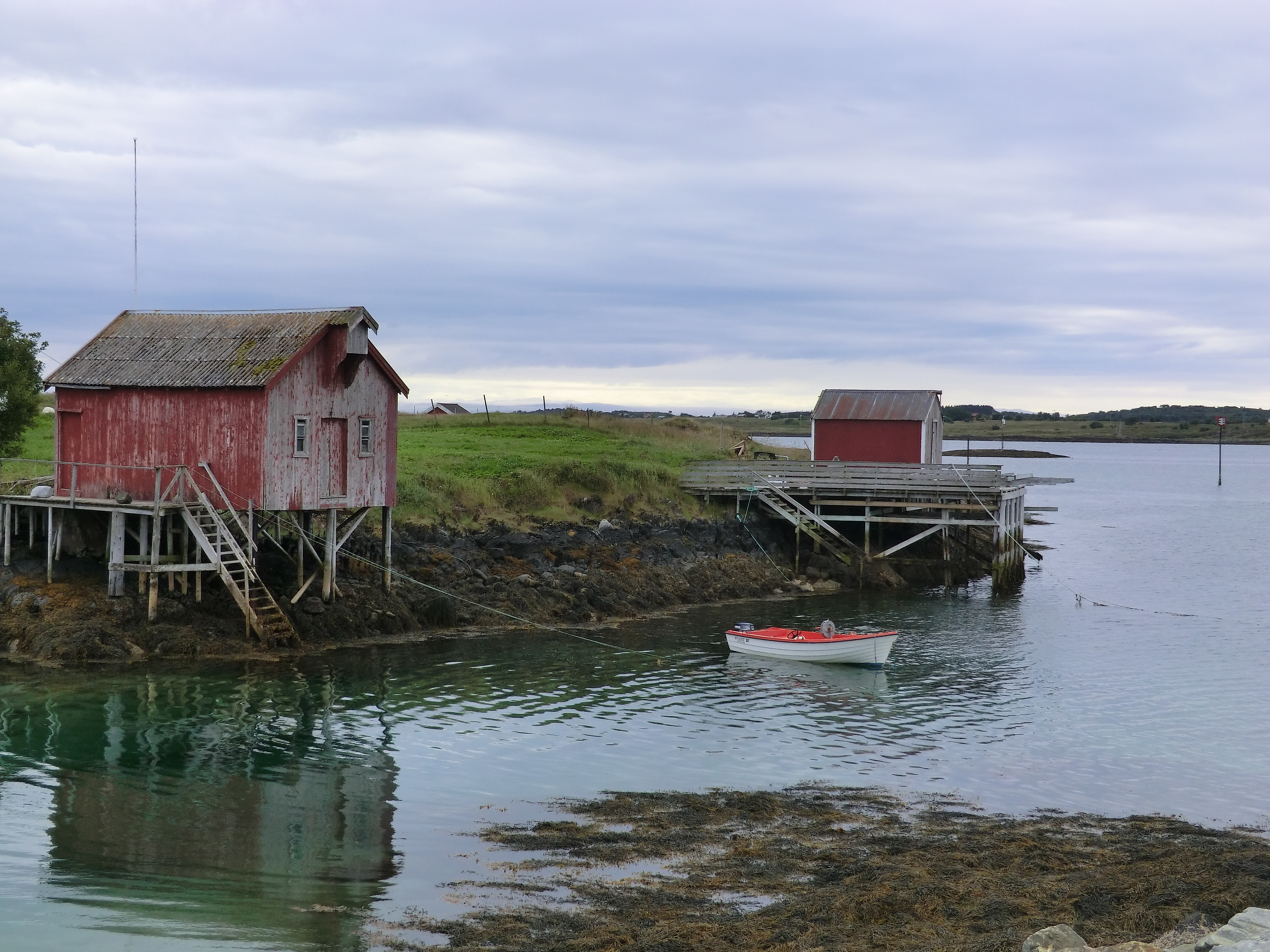 Herøy, Norway